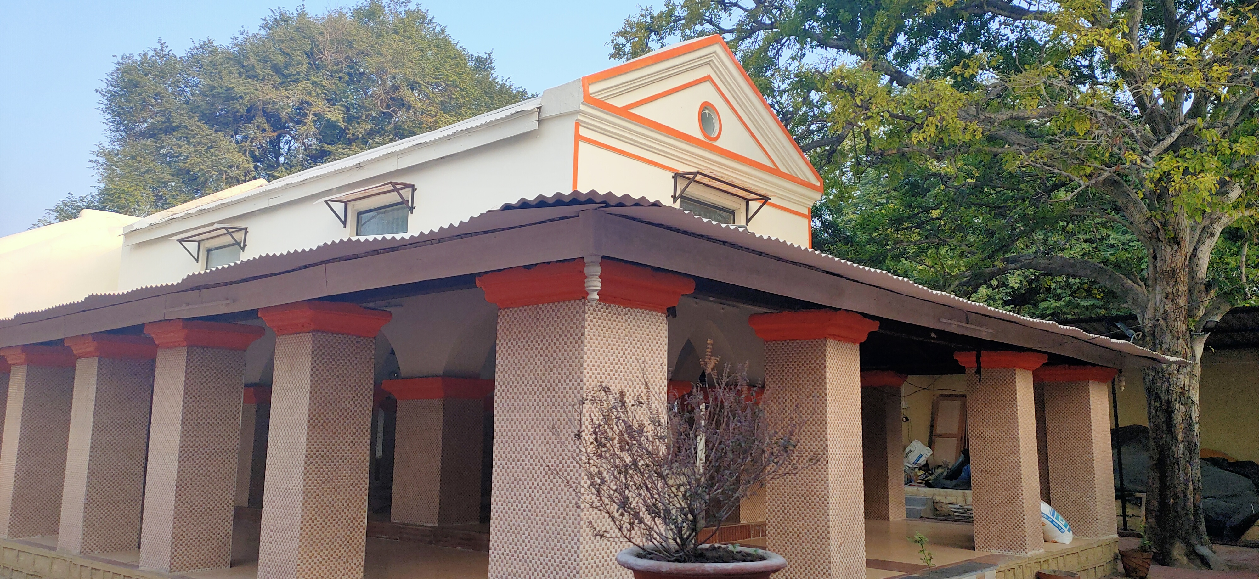 अंजनवती मठ